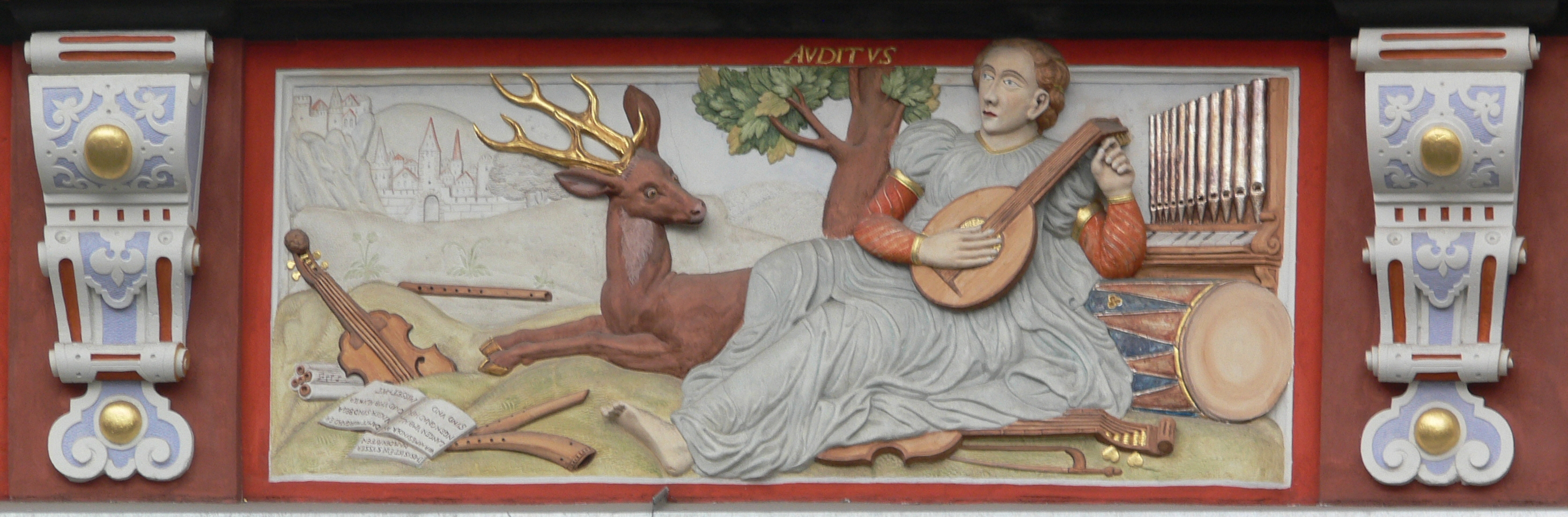 Haus "Zum Breiten Herd" am Fischmarkt in Erfurt Fassadendetail: Relief "Auditus" (Gehör)